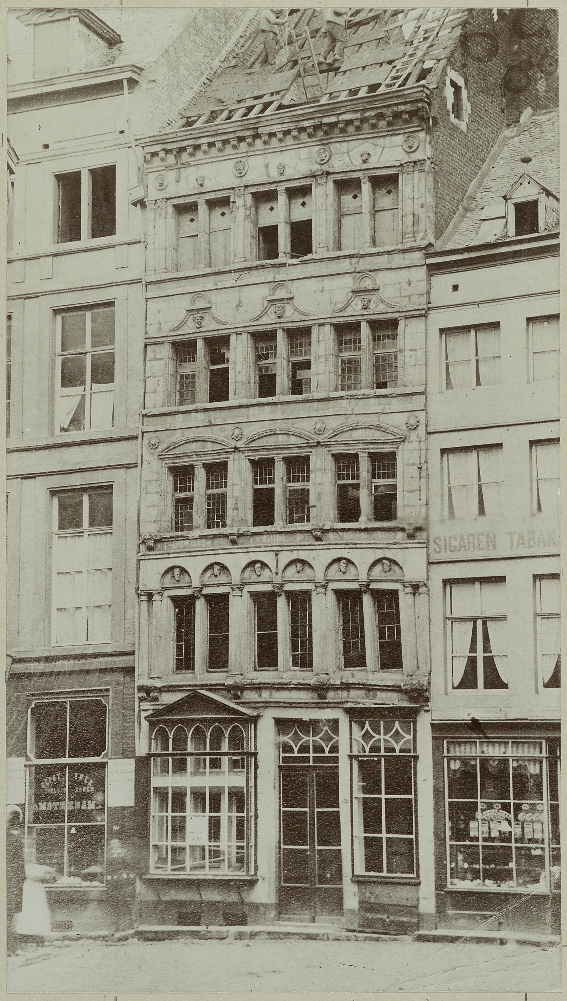 Winkel/ Sloop: Winkel tijdens sloop (opmerking: Zie ook neg 5.975 repro)